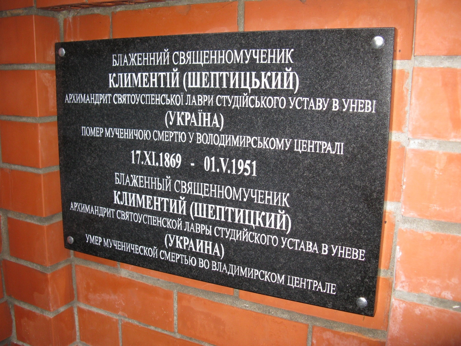 Церемонія відкриття меморіальної дошки Климентію Шептицькому на Князь-Владимирському цвинтарі у Владимирі 30 жовтня 2010 року.